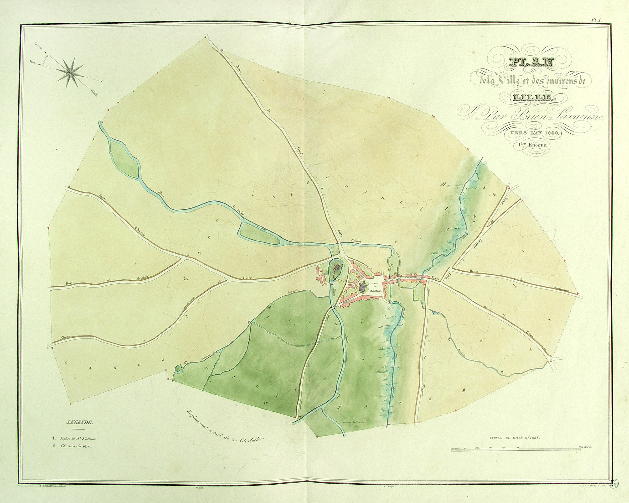 Titre du document: Plan de la ville et des environs de Lille vers l'an 1000 Cote Bibliothèque Municipale de Lille : 44572, planche 1 Type de document : lithographie 45 x 60 cm Autres : Planche extraite de l'Atlas topographique et historique de la ville de Lille, par Brun-Lavainne